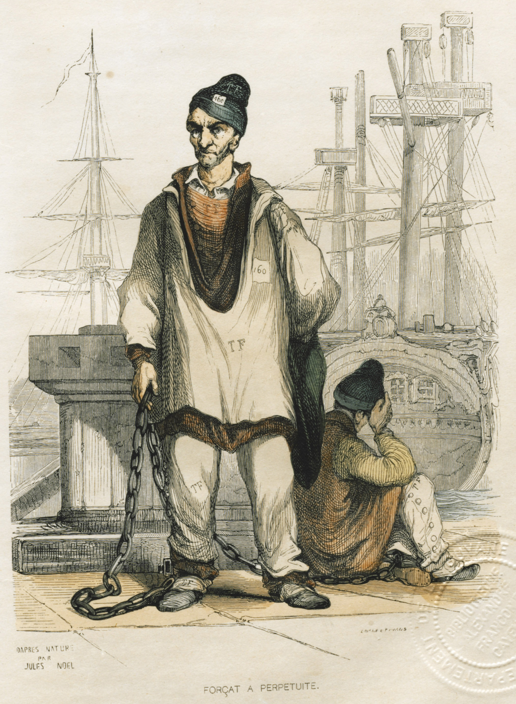 Condamnés à perpétuité, dessin au crayon de Jules Noël, musée des beaux-arts de Brest. Drawing of a prisoner at the Bagne of Toulon, 19th C.